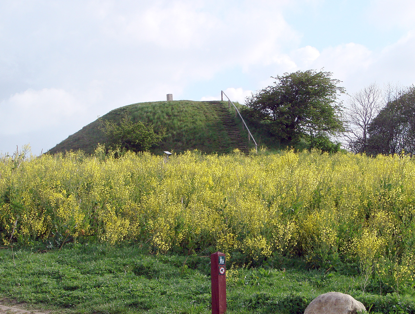 Jelshøj er med sine 128 meter over havet det højeste punkt ved Århus, Denmark. Den ligger i Skåde Sogn syd for Århus i det vældige bakkedrag Holme Bjerge og er en bronzealderhøj.